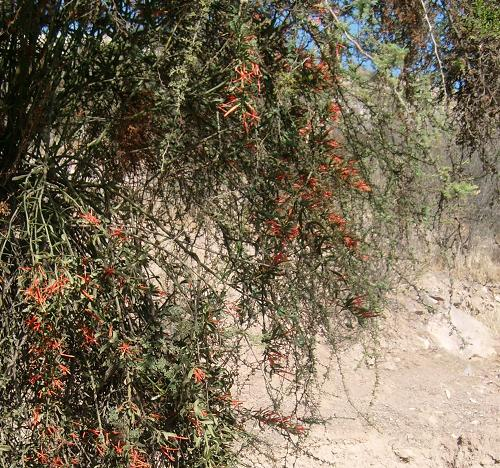 Ligaria cuneifolia (Ruiz et Pav.)van Tigh, liga or quintral del espino, Central Chile